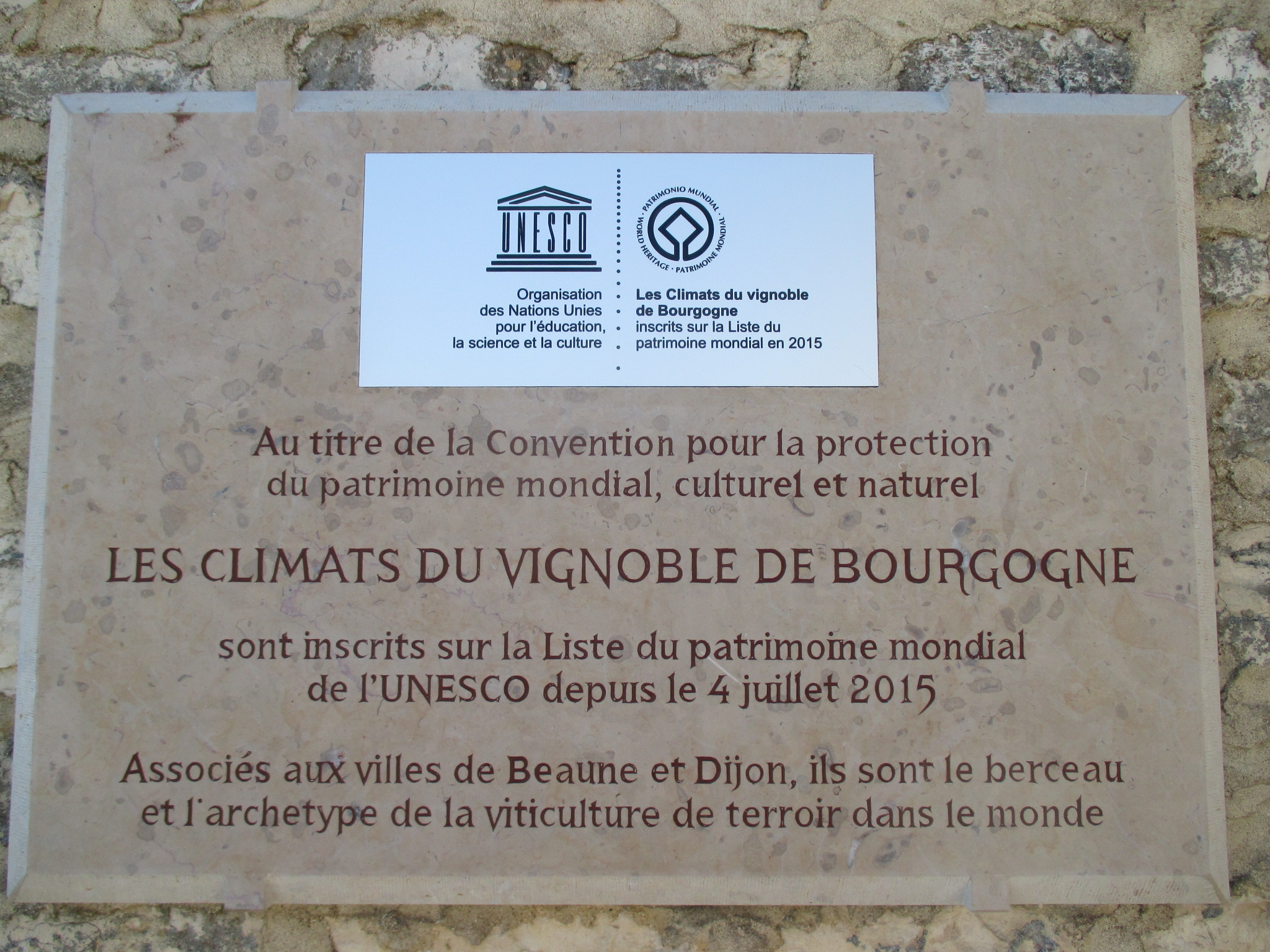 Les climats du vignoble de Bourgogne classés au Patrimoine mondial de l'UNESCO (plaque du Château du Clos Vougeot